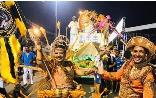 Casal de mestre-sala e porta-bandeira da Pérola do Samba no desfile em 2020.